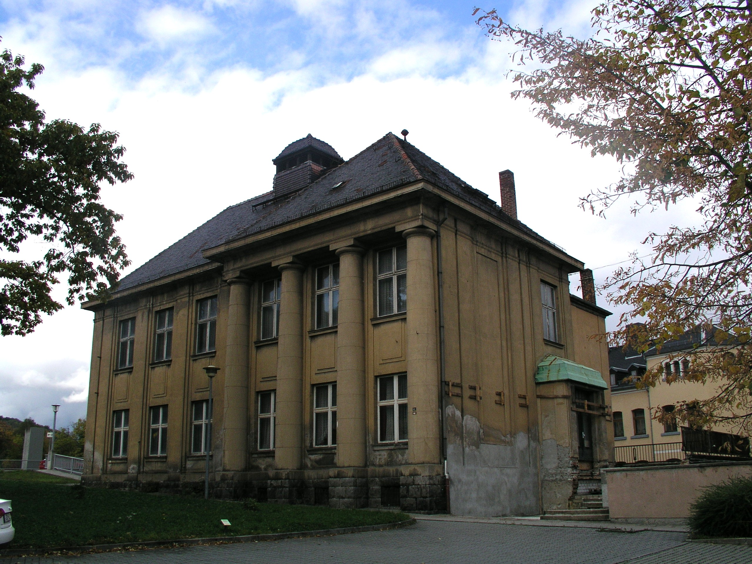 eh. „Clemens Winkler-Club“ an der Bahnhofsbrücke (Wissenschaftlertreff nach dem Chemiker Clemens Winkler)